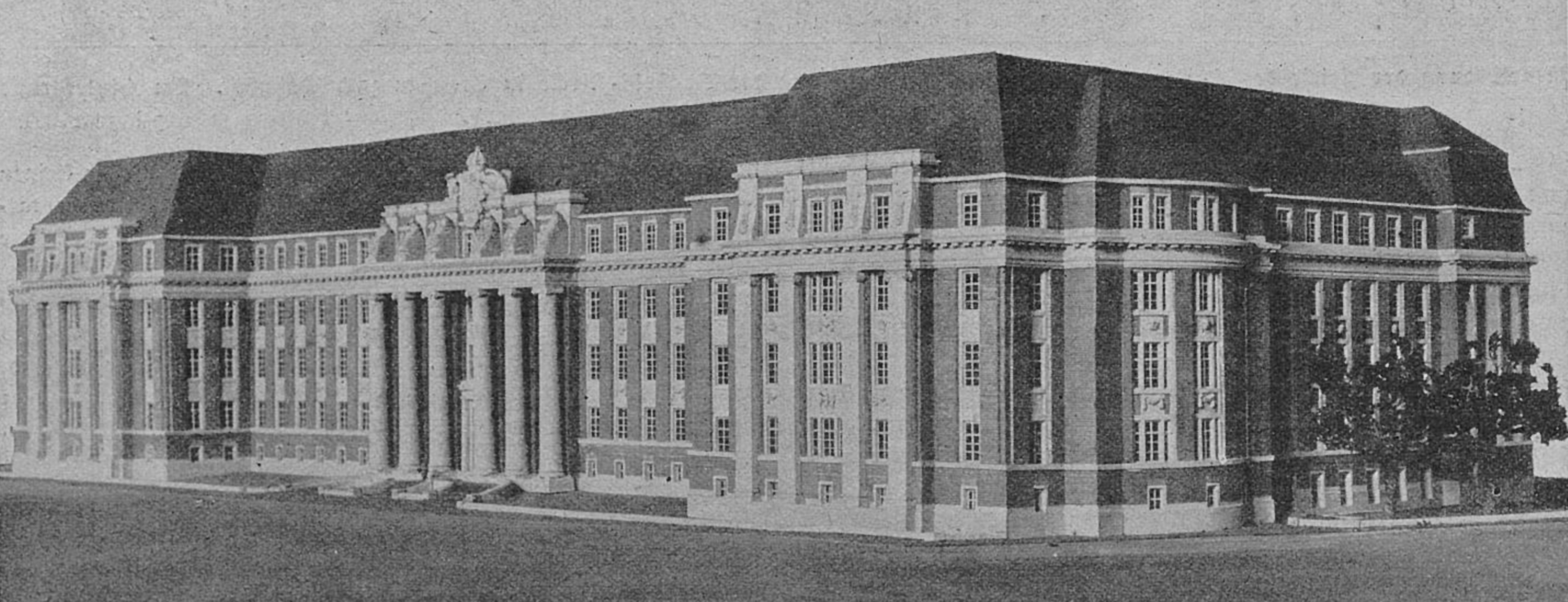 Das neue Justizgebäude an der Mühlenstraße in Düsseldorf, das an der Stelle des alten Präsidialgebäudes errichtet wird. Das Gebäude wird 120 m lang, 50 m tief und 20 m hoch; an Kosten sind 35000000 Mk. bewilligt (1914)